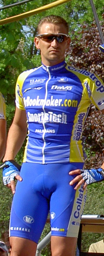 Cyclist Frank Van Den Broucke